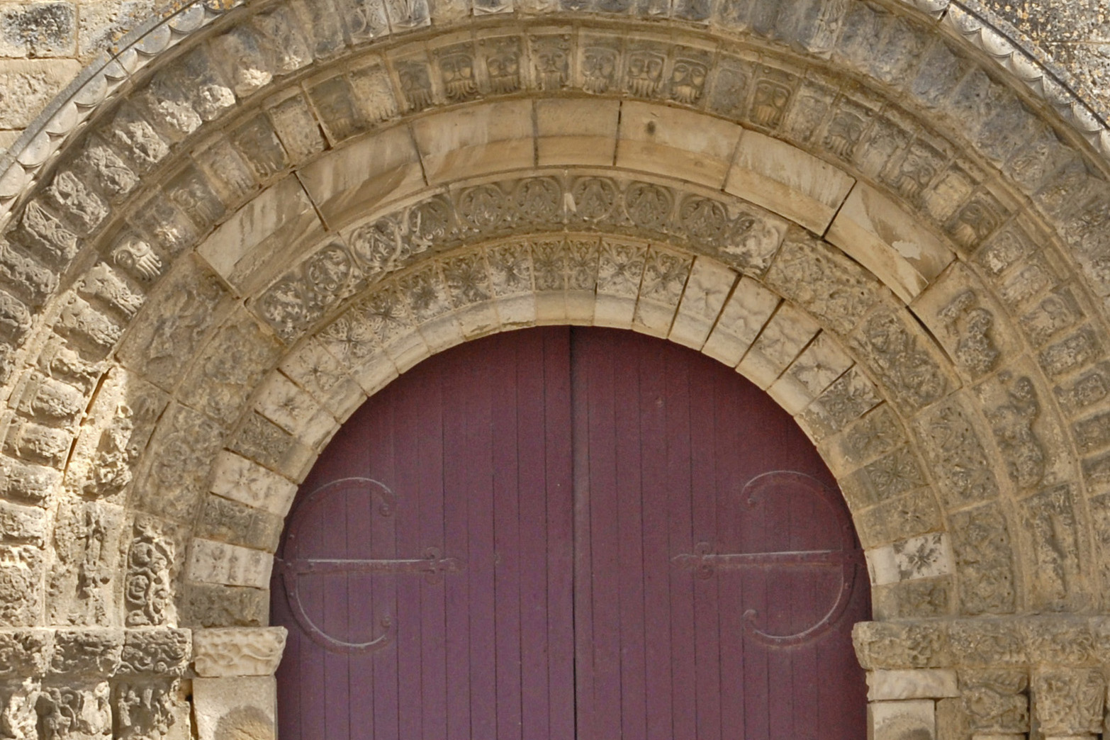 Saint-Jouin-de-Marnes, Archivoltenbögen Hauptportal